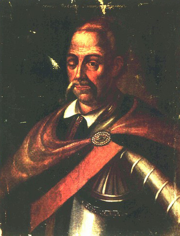 Портрет Данила Апостола